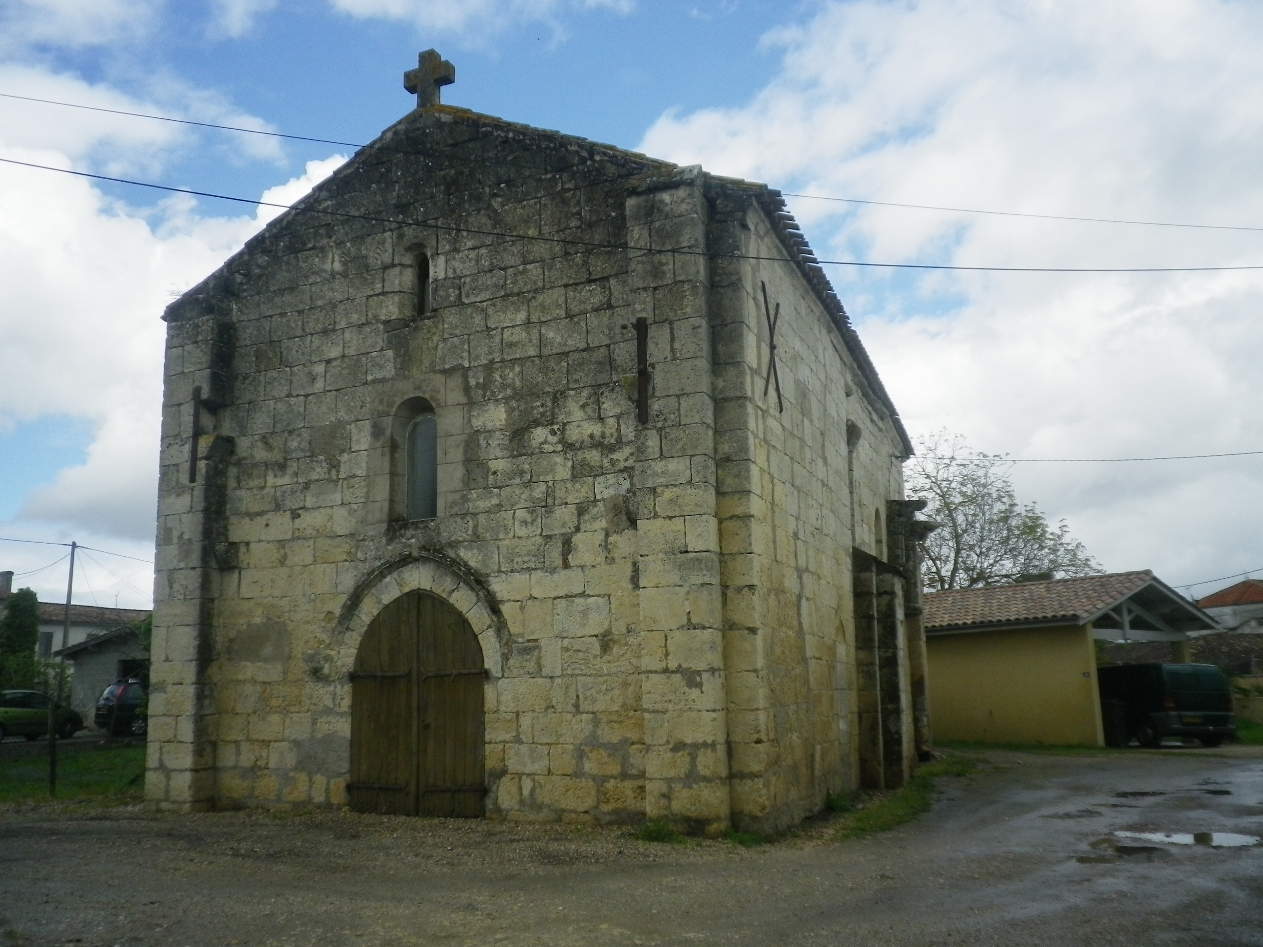 Chapelle St Nicolas, au port de Génissac (33). Pentax Optio H90